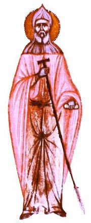 Երևան, ձեռ. 1502, էջ 260բ, Հայսմավուրք, 1651 թ., Կ. Պոլիս